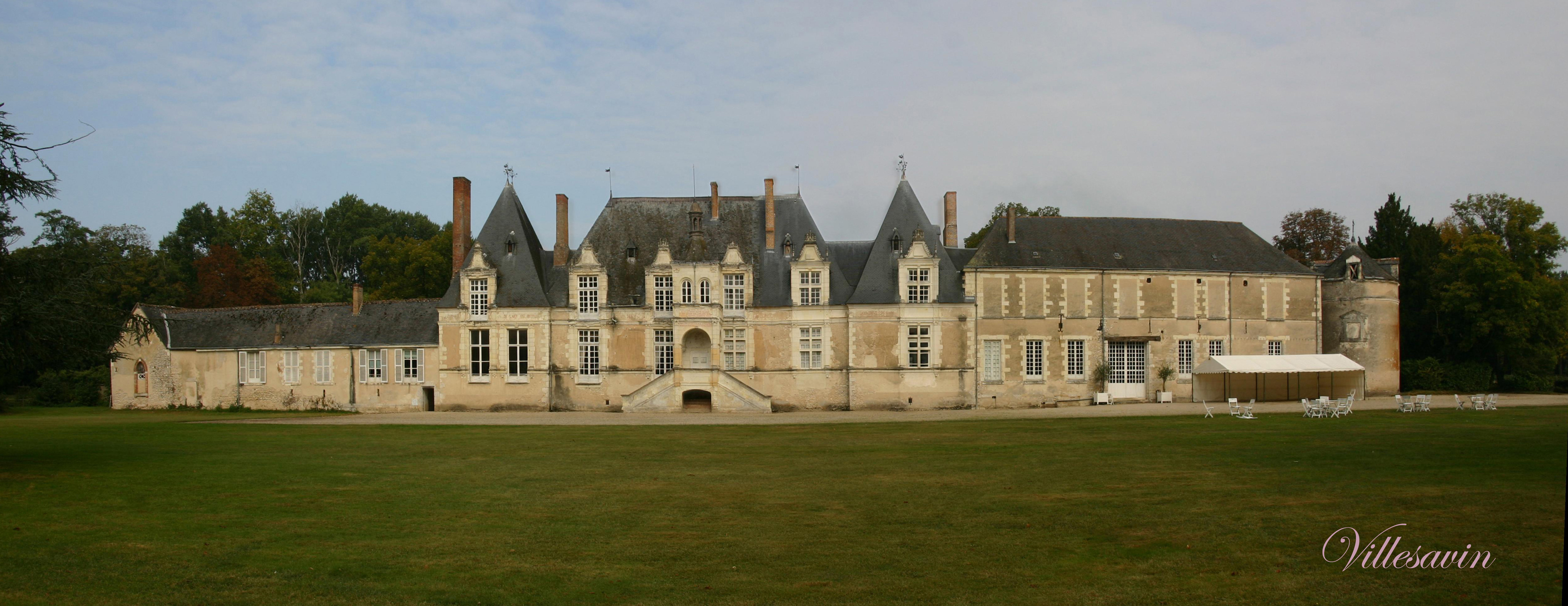 Château de Villesavin